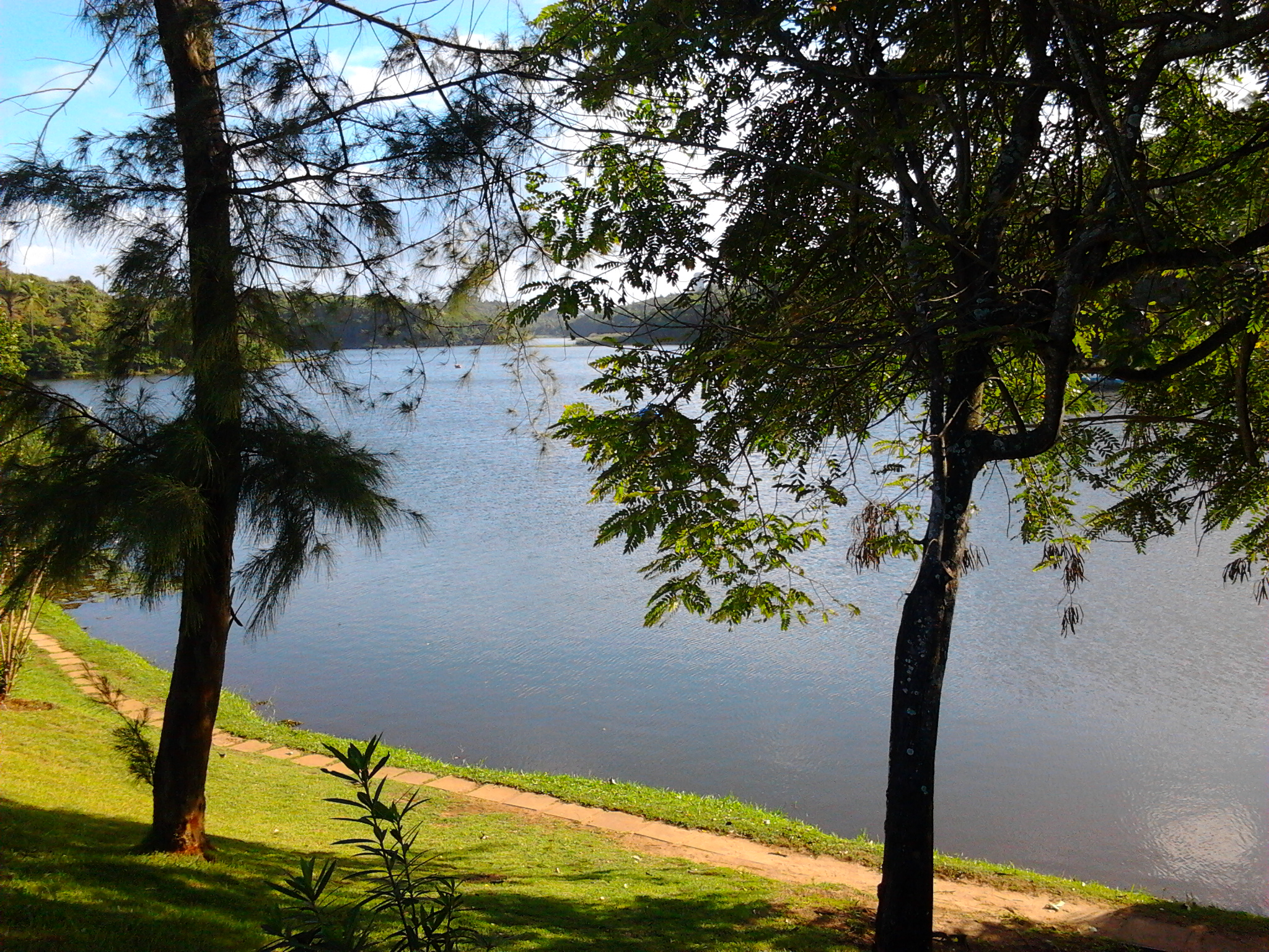 Vista da LAGOA DE PITUAÇU